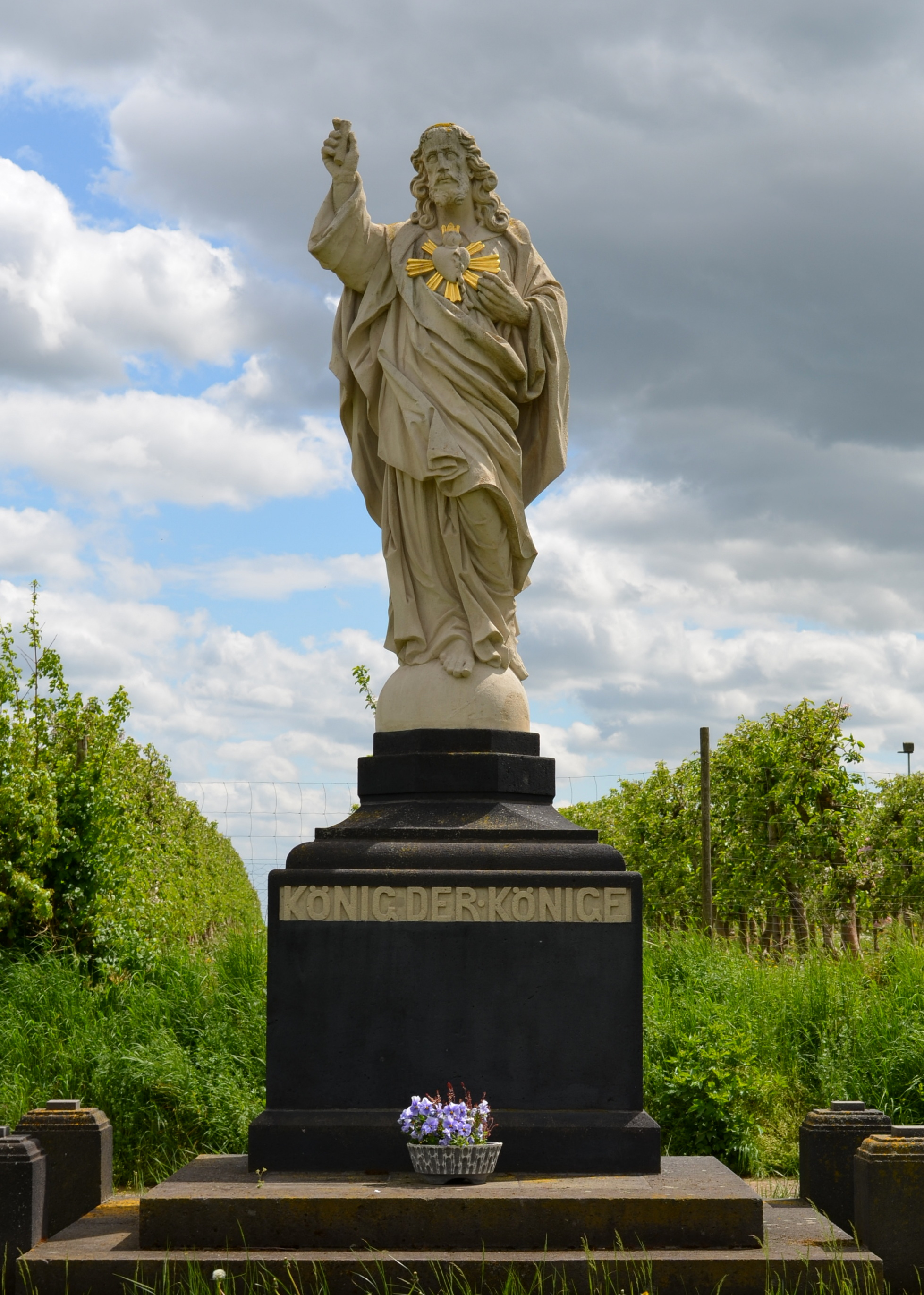 König der Könige